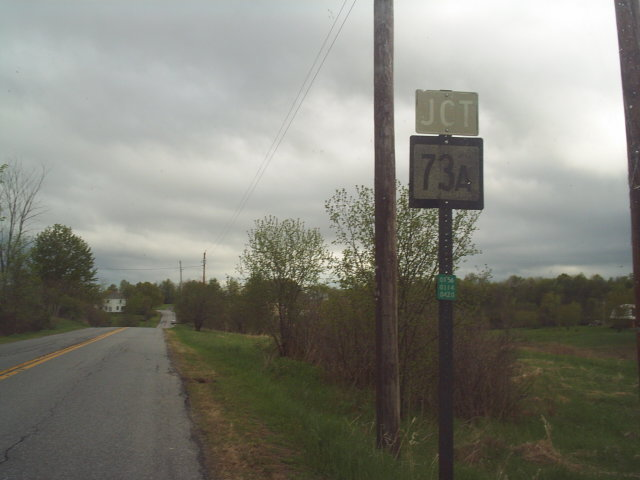 M3367S-4504